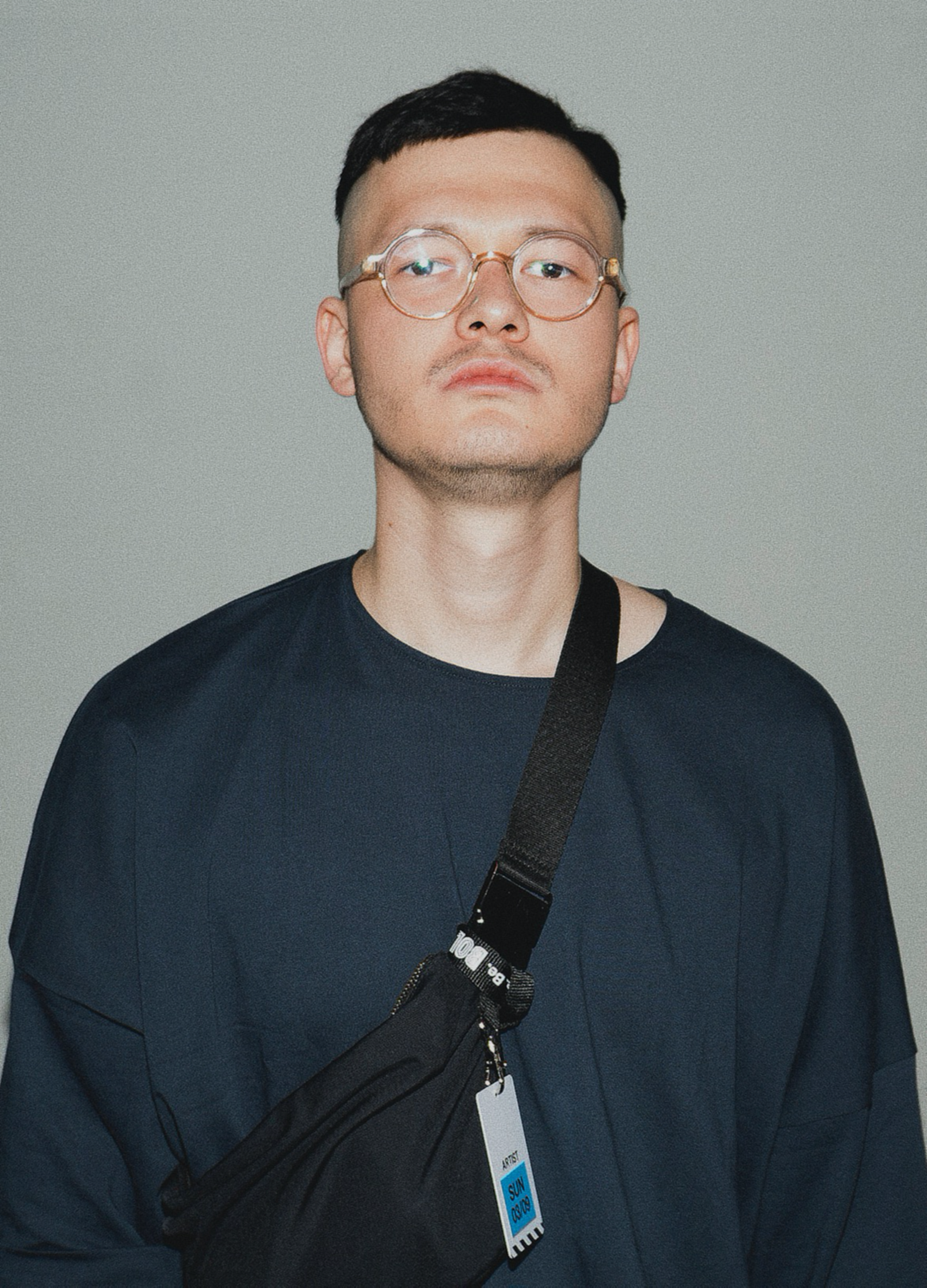 Michael Weicker auf der Fashion Week Berlin 2018